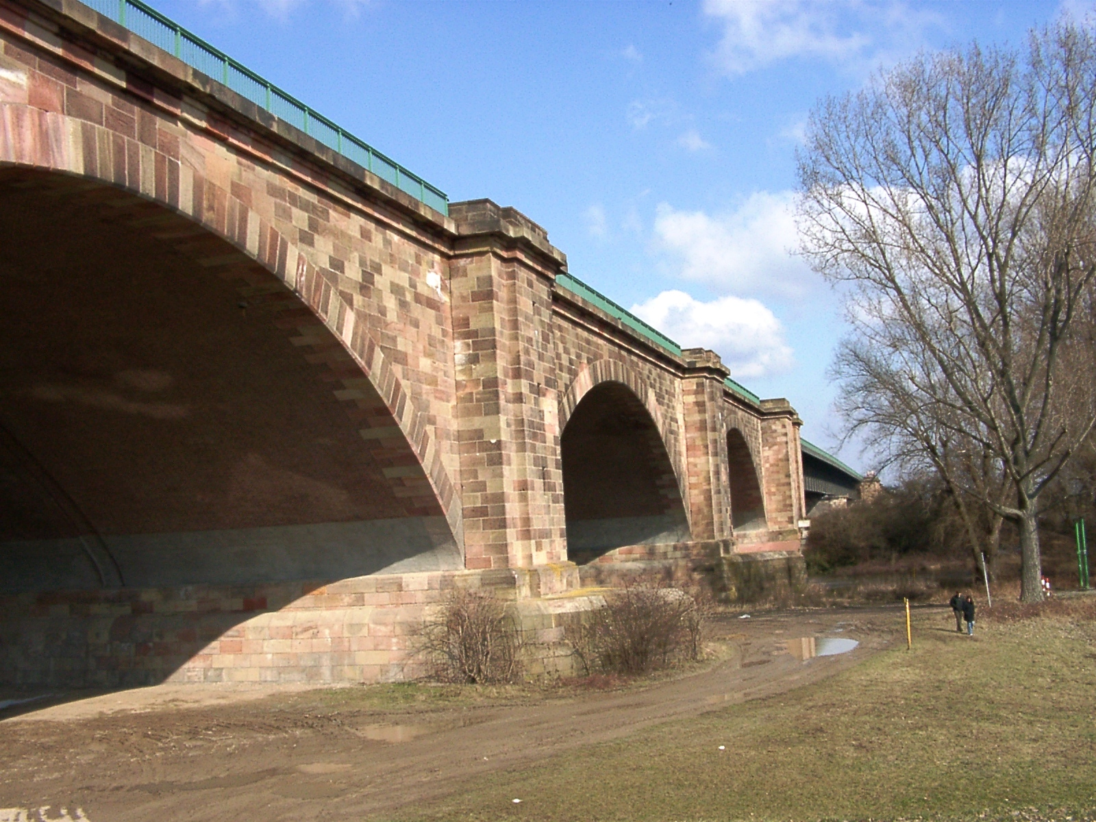 Theodor-Heuss-Brücke (Rheinbrücke Frankenthal/Frankenthal), Südseite der westlichen Vorlandbrücke bei Frankenthal mit Übergang auf die Strombrücke